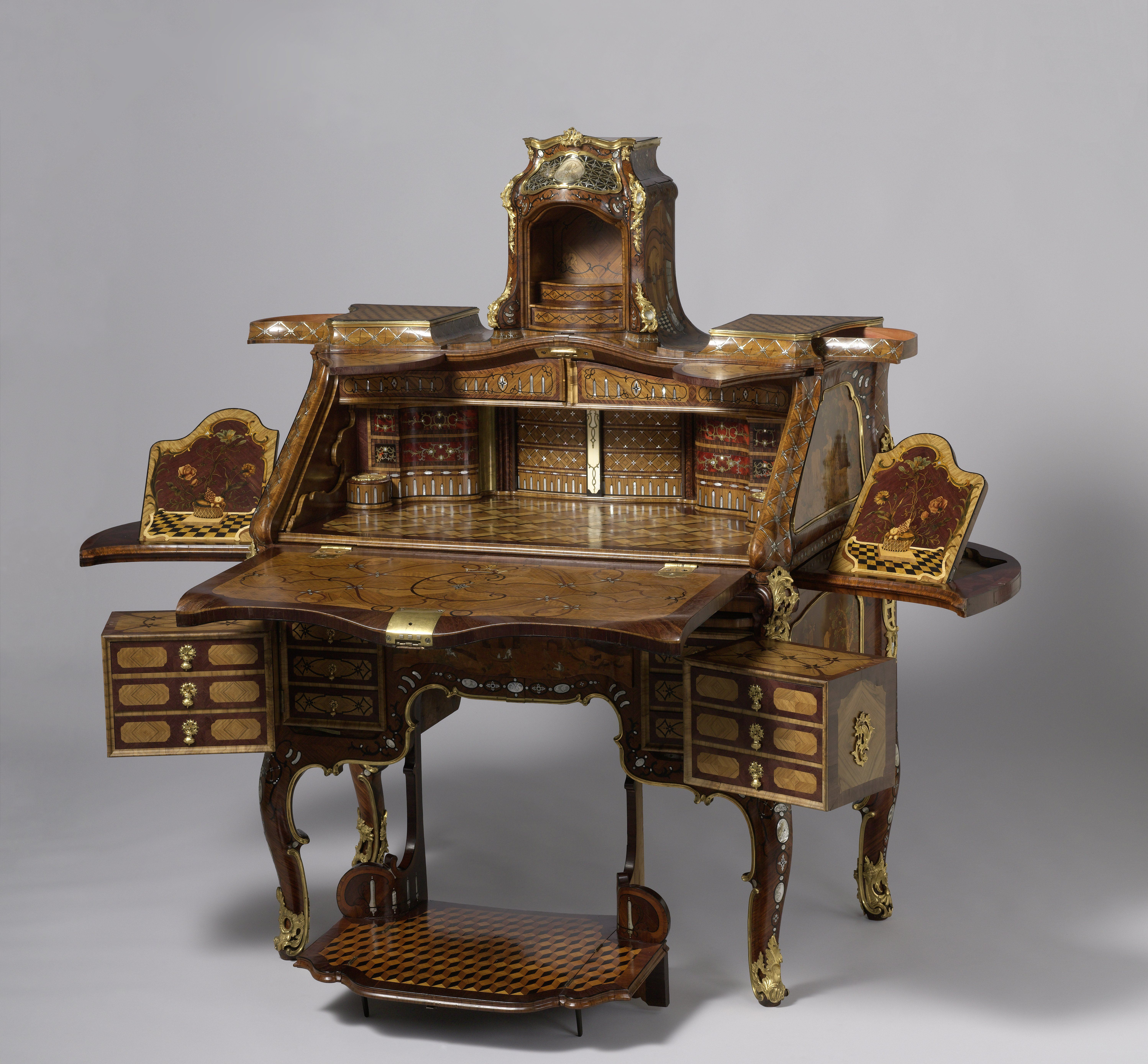 IdentificatieTitel(s): BureauObjecttype: schrijfmeubel bureautafel Objectnummer: BK-16676Opschriften / Merken: omschrift, portretmedaillon: ‘IOAN.PHILIP.D.G.ARCHIEPISTREVIR.S.R.I.PRIN.ELECT.ADMIN.PRUM.P.P.’monogram, troonhemel, klep en binnenzijde klep: ‘JPC’inscriptie, muziekboeken beslag: ‘ALL: // GLOR:’opschrift, op plank achter linker paneel in onderkast, in potlood: ‘Wer rdlich denckdt undt // freundscft häldt, verdiendt // Den gess der Weldt’ (Wer redlich denckdt undt // freundschaft häldt, verdiendt // Den genuss der Weldt.)Omschrijving: Bureau op S-vormige poten, versierd met marqueterie in meerdere materialen. De geschulpte voor-en zijkanten van het onderstel dragen figuratieve marqueteriepanelen, evenals de zijkanten van het bovenstel en de velden van het centrale opzetstuk. Op het schrijfblad is een troonzaal vol verwijzingen naar de keurvorst van Trier afgebeeld, waaronder de initialen I.P.C. Het middenveld aan de voorkant van het onderstel ligt hoger dan de zijvelden. Overdadig versierde lijsten en ornamenten in marqueterie en beslag.VervaardigingVervaardiger: meubelmaker: Abraham RoentgenPlaats vervaardigingNeuwiedDatering: ca. 1758 - ca. 1760Fysieke kenmerken: eiken-, esdoorn- en notenhout, belijmd met diverse houtsoorten, schildpad, zilver, parelmoer, koper, ivoor, verguld bronsMateriaal: hout eikenhout notenhout esdoornhout rozenhout ebbenhout palissanderhout kersenhout satijnhout schildpad zilver parelmoer koper been brons ivoor staal tin Techniek: verguldenAfmetingen: h 148,5 cm × b 110 cm × d 58,5 cmgrondvlak: b 110 cm × d 58,5 cmOnderwerpWatstill life of plants, flowers and fruitthrone-roomWieJohann Philipp von WalderdorffVerwerving en rechtenVerwerving: overdracht van beheer 1960Copyright: Publiek domein